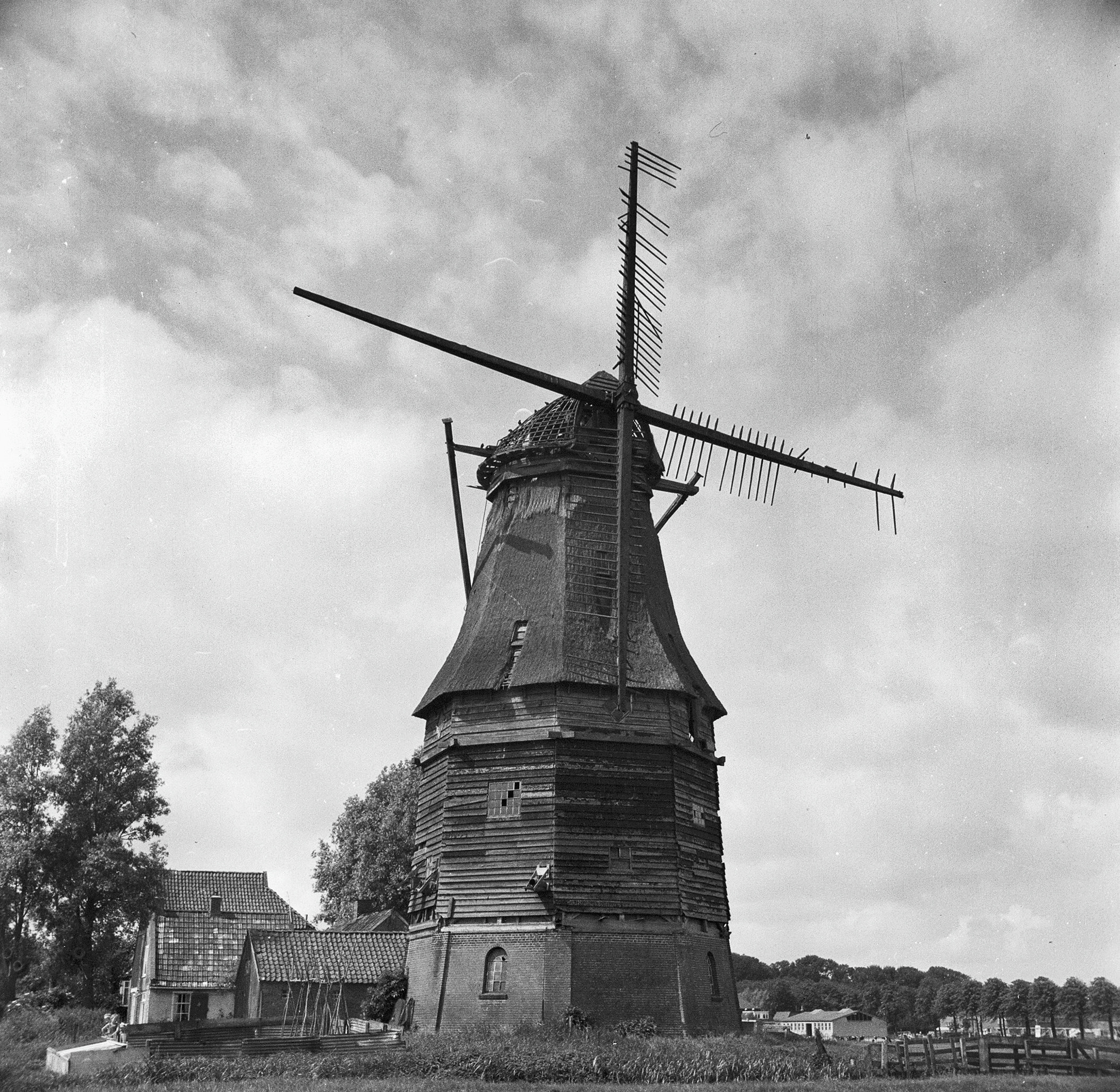 Diversen: Korenmolen "Penninga's Molen" in desolate toestand